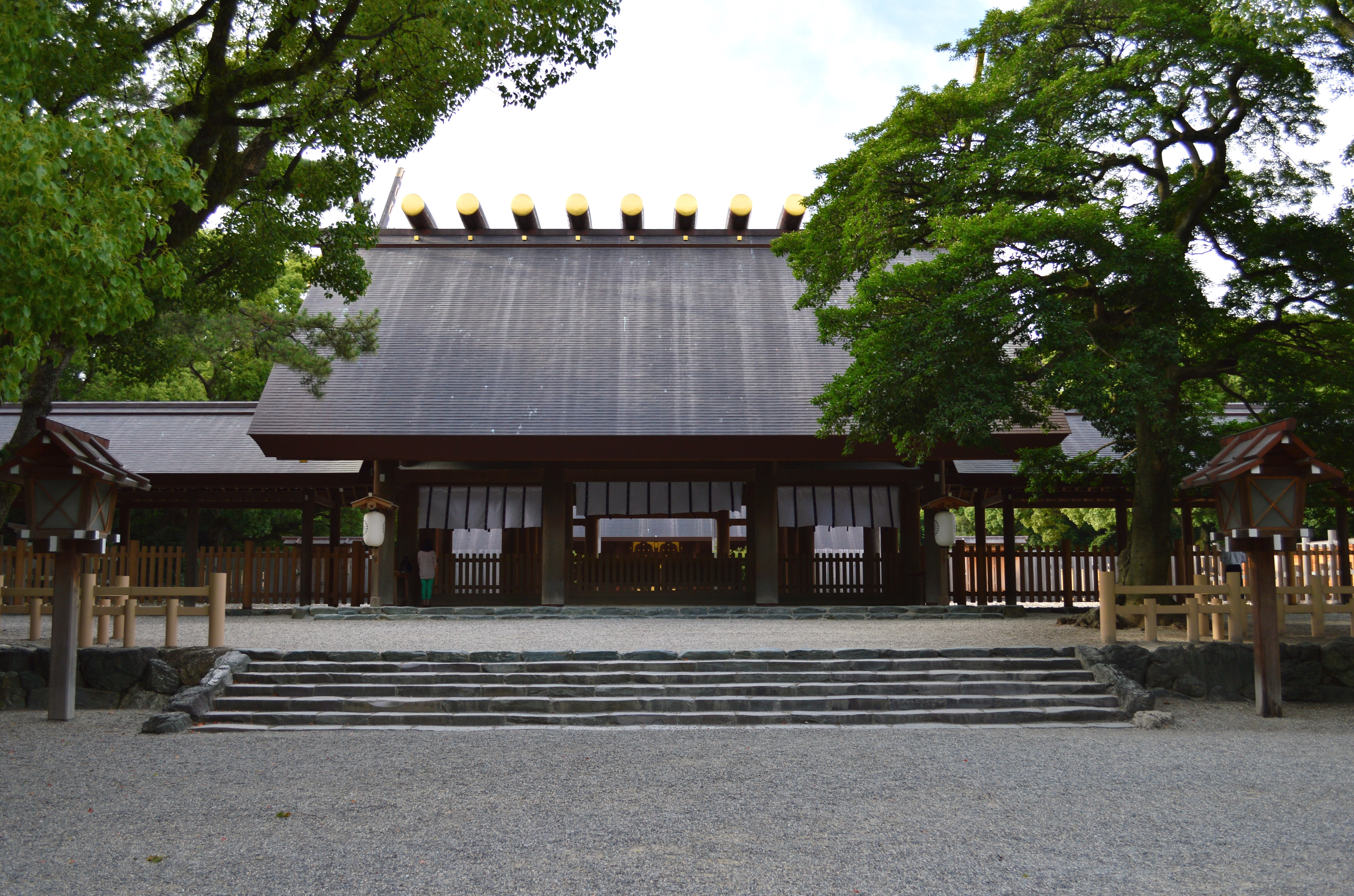 熱田神宮 正面